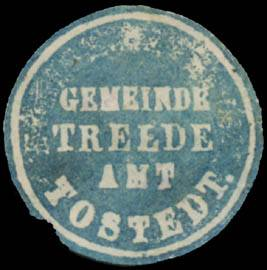 Sealing stamp Title: Gemeinde Trelde Amt Tostedt Description: blau, weiß Place: Trelde size: 3 cm